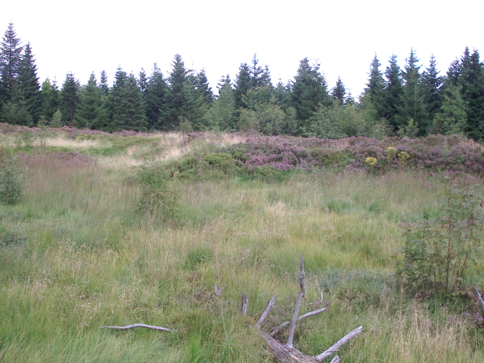 Röschenschanze Bild 2